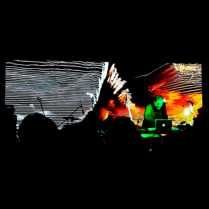 Theremyn_4 en vivo 2018 en Espacio Fundación Telefoónica en Lima